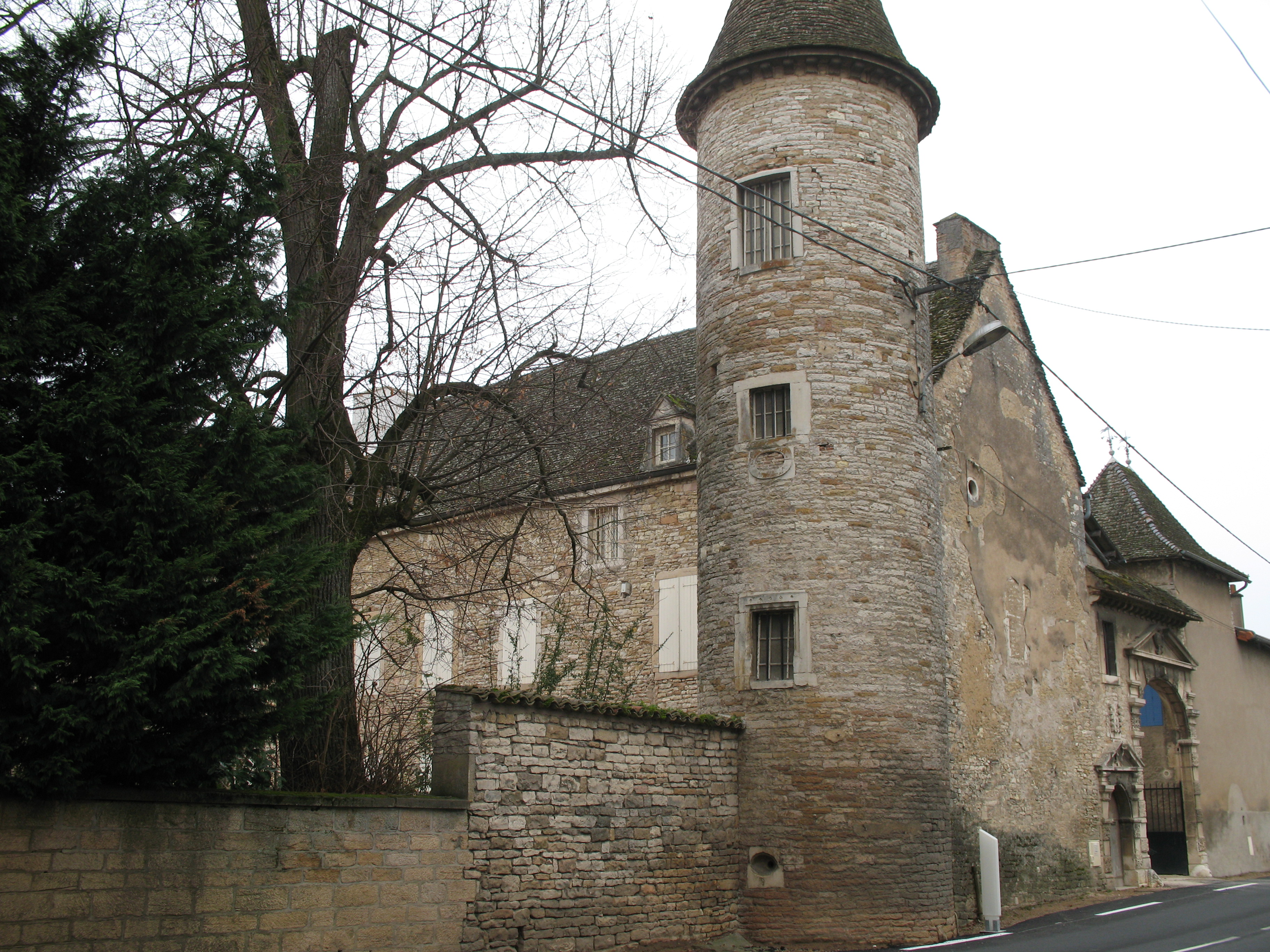 château de Fleurville (Saône-et-Loire)